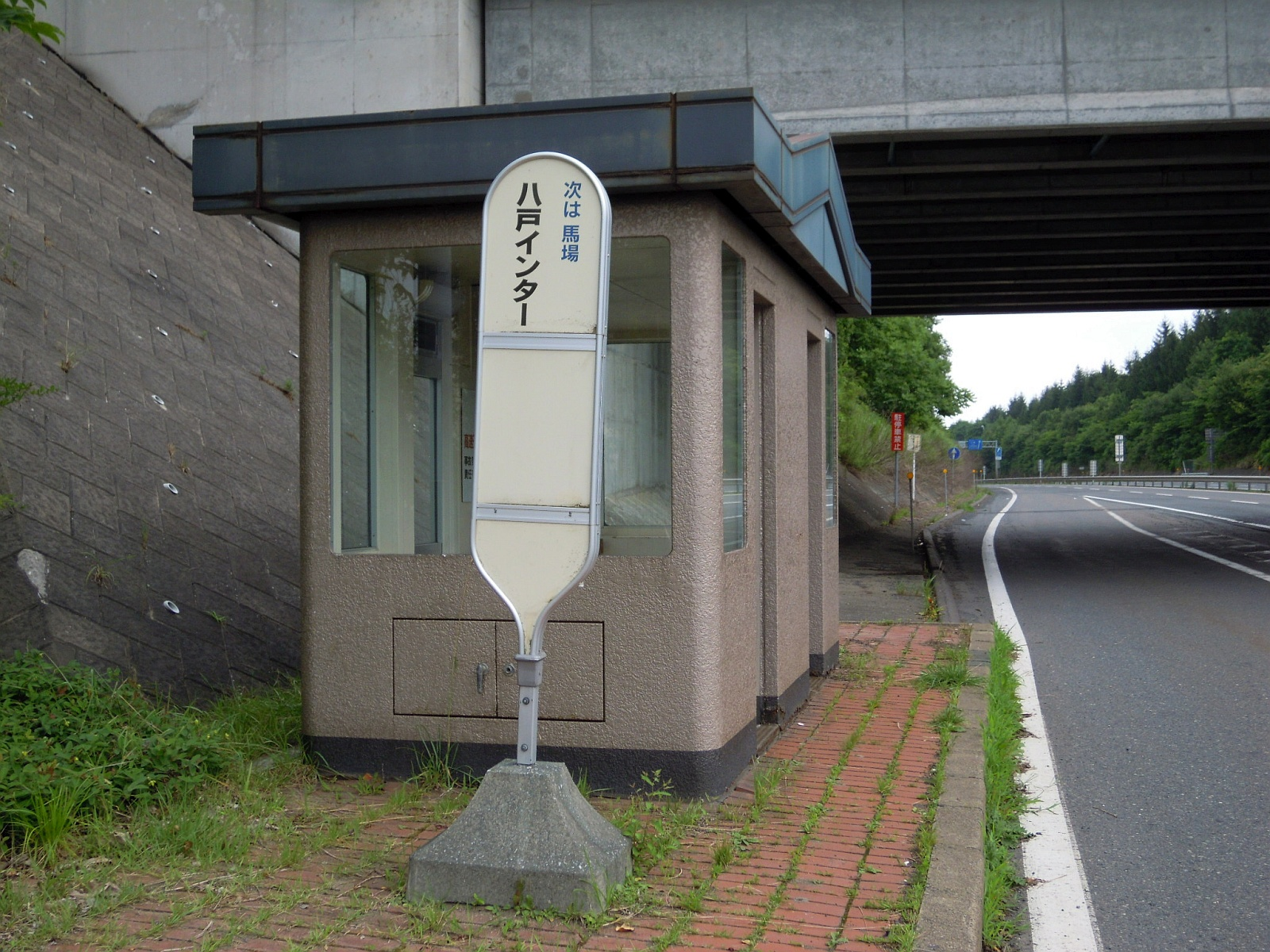 青森県八戸市の八戸自動車道八戸インターチェンジに近接する八戸バスストップ